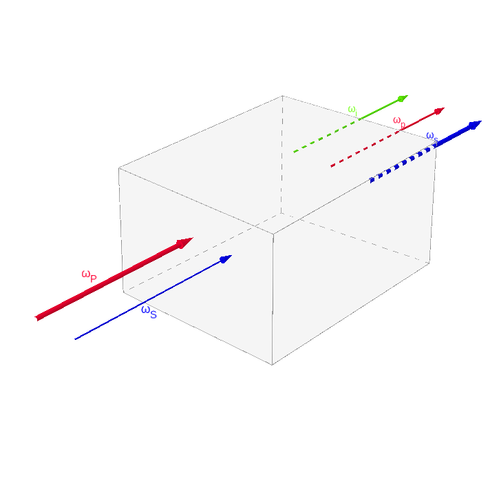 V kristal vstopita vzporedna črpalni žarek in signal. Po prehodu se črpalni žarek oslabi, signal pa ojača. Na izhodu nastane še dodaten nedejavni signal.